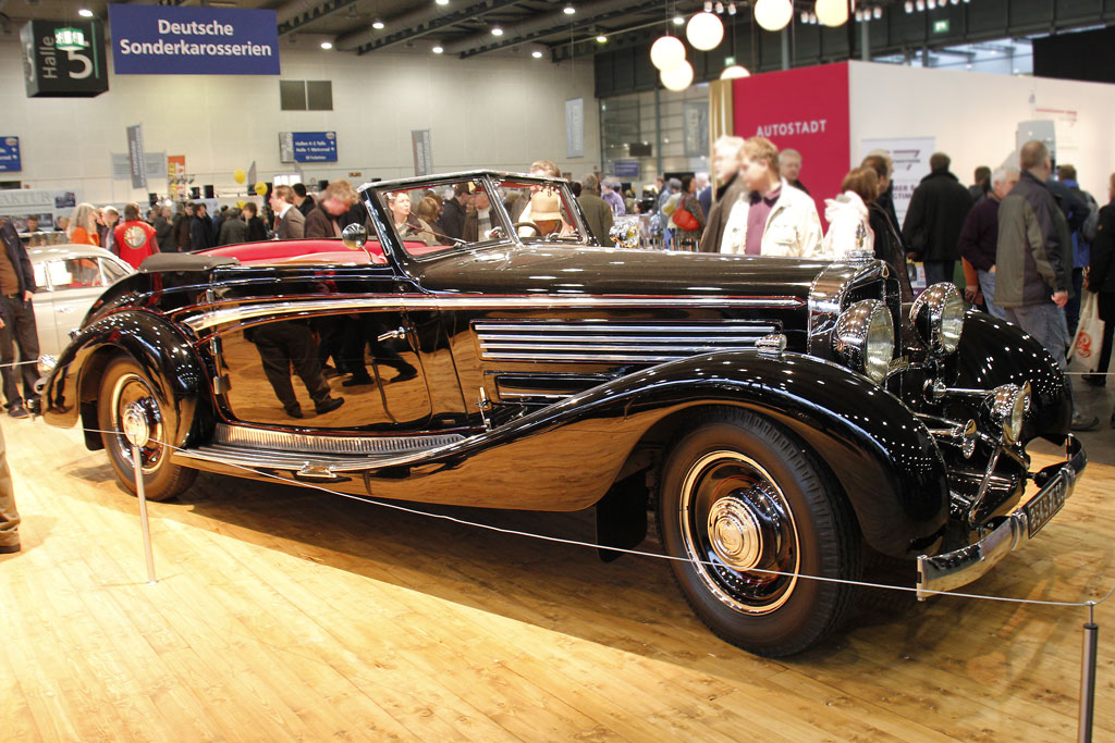 1937 Maybach DS 8 "Zeppelin" Sport Cabriolet Karosserie Spohn